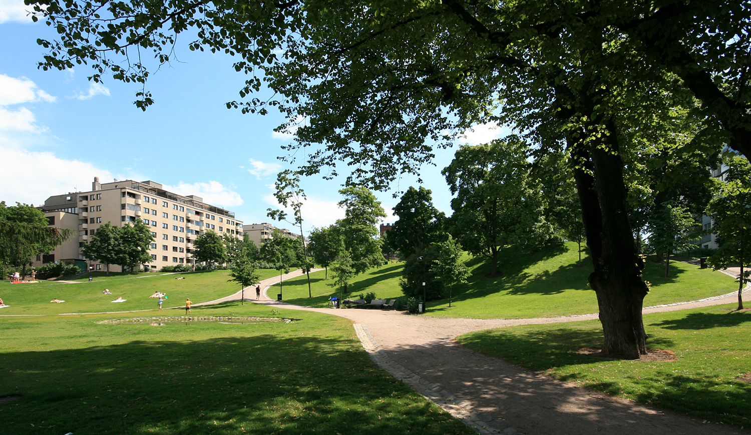 Sinebrychoffin puisto, Punavuori, Helsinki.